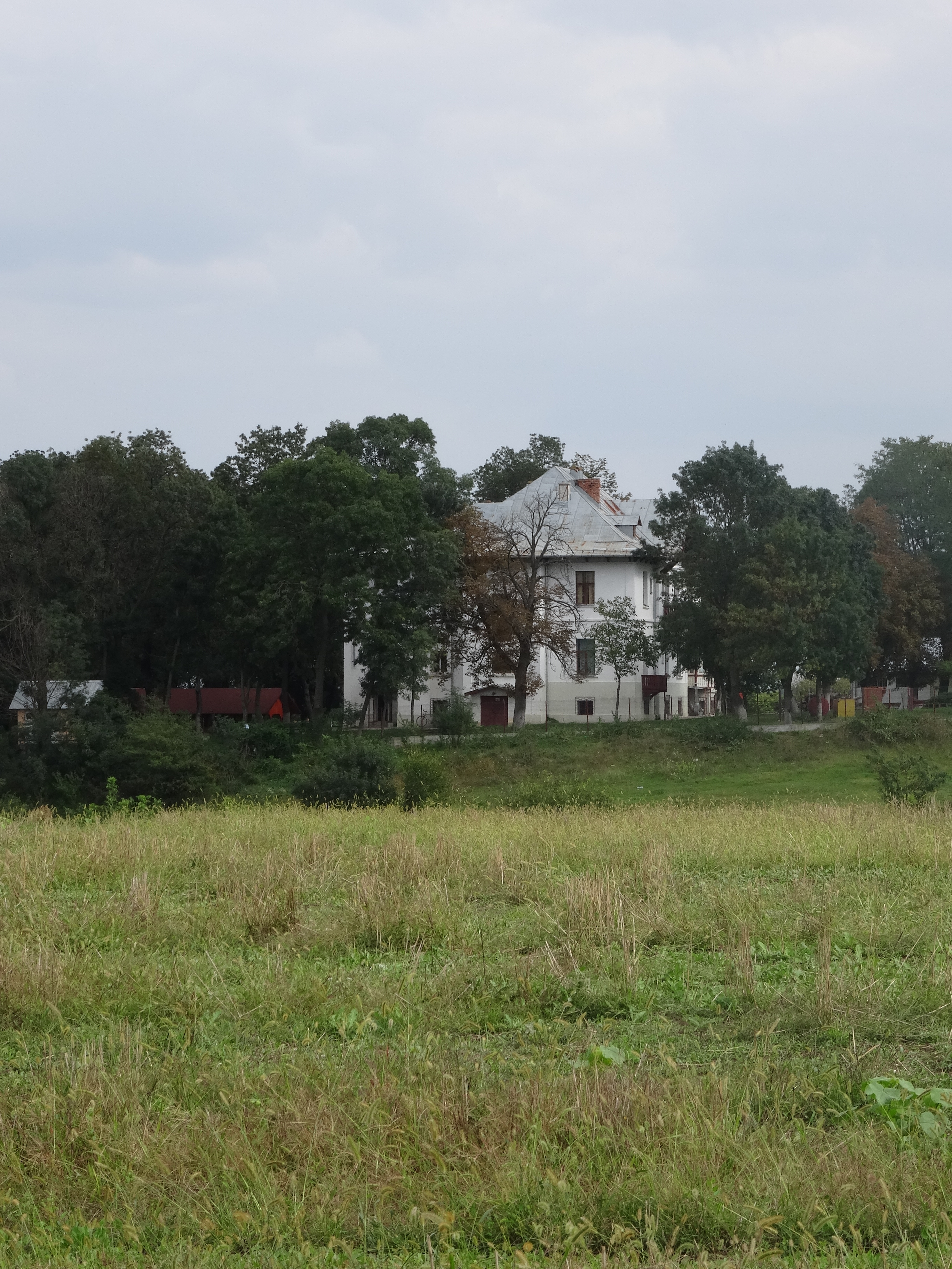 Spital de recuperare 02